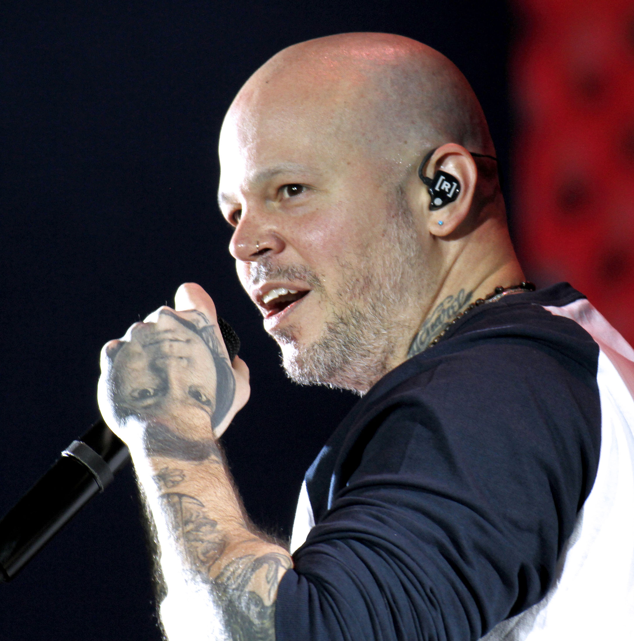 Domingo 8 de diciembre de 2019 En la explanada del Zócalo de la Ciudad de México este 8 y 7 de diciembre se realizó: Radical Mestizo. Festival Internacional de Música del Mundo. Con la participación de artistas nacionales e intenacionales, tanto reconocidos como emergentes. La clausura del festival se llevó a cabo por Residente, rapero, compositor y productor de nacionalidad puertorriqueña. Fotografía: Maritza Ríos / Secretaría de Cultura de la Ciudad de México